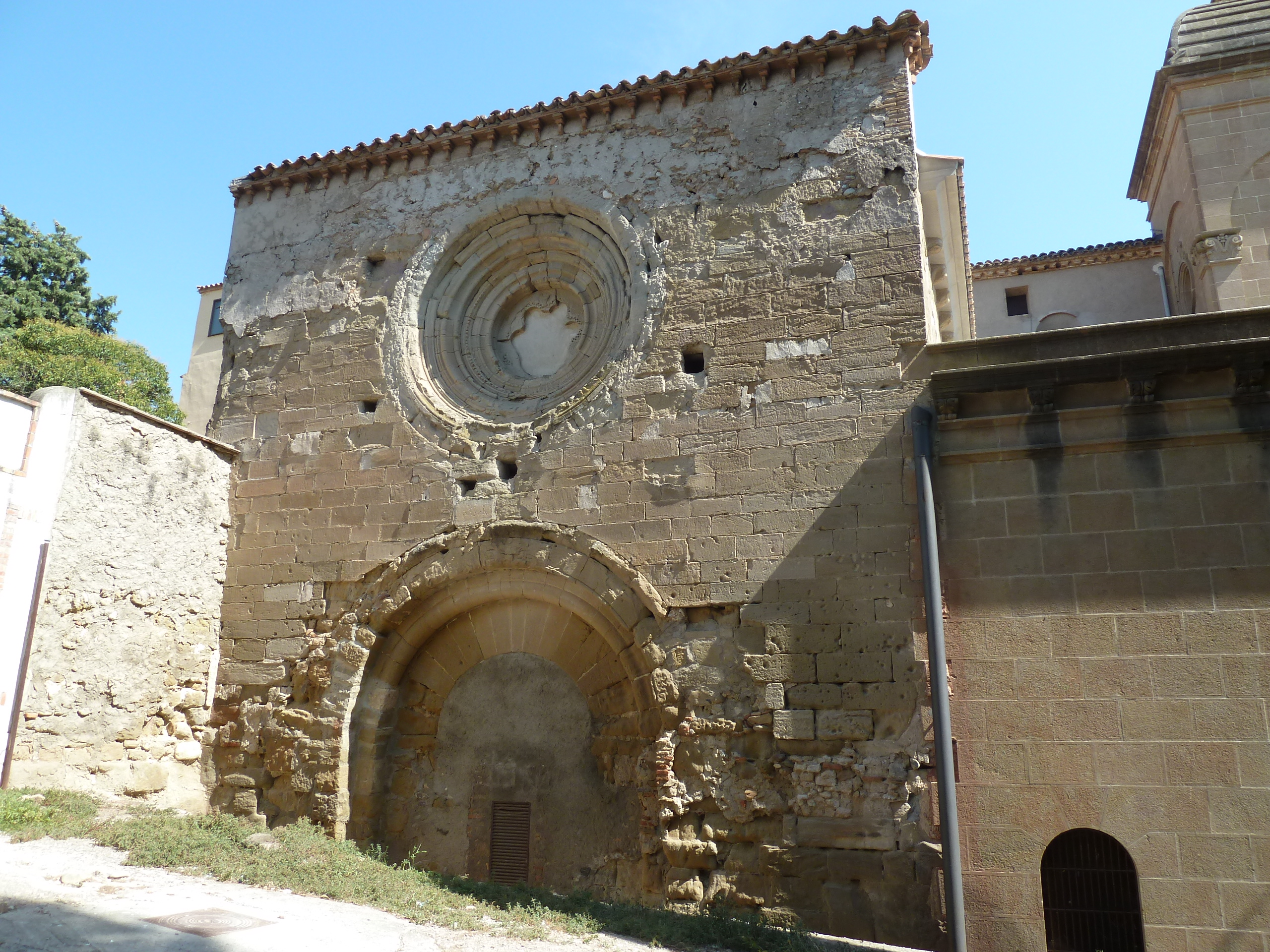 Balaguer